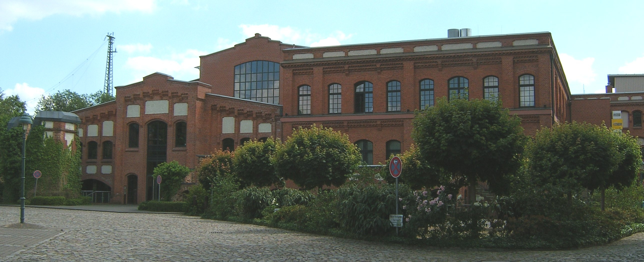 Hamburg, Bahrenfeld, Kraftwerk Leverkusenstraße